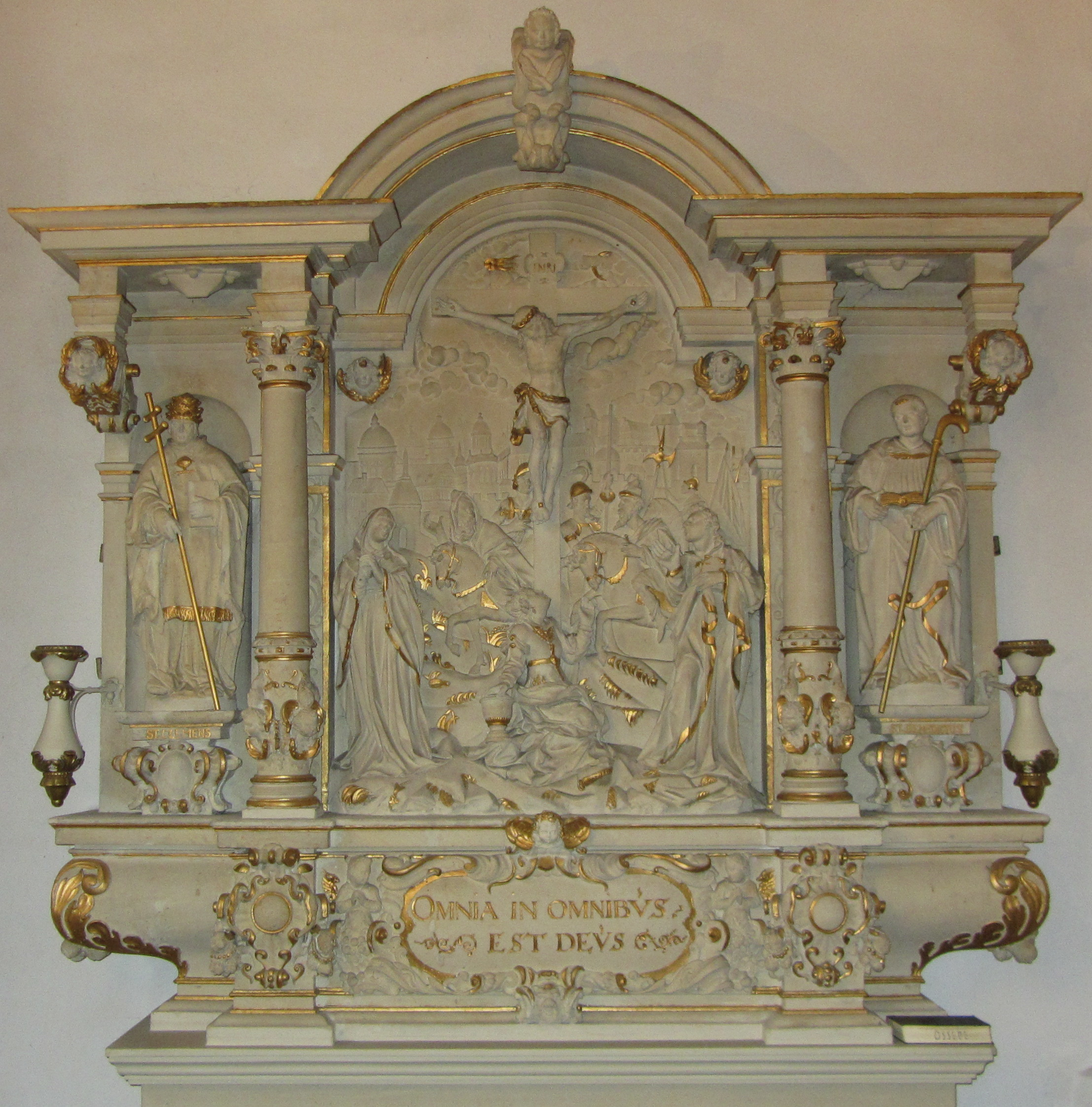 Altar in der Pfarrkirche in Glandorf